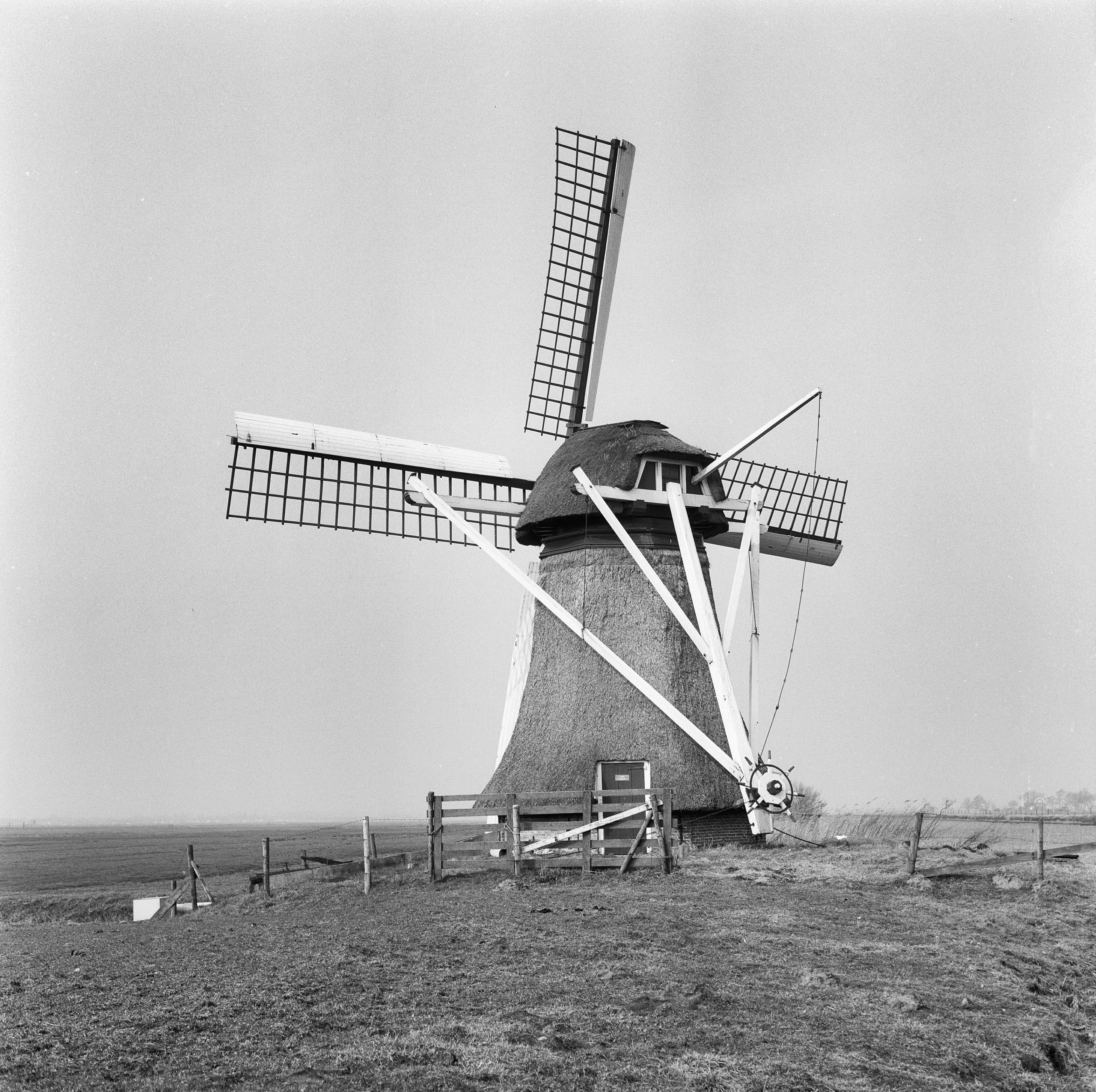 Ten-Bruggencatenummer: 03289: Overzicht (opmerking: Van deze molen is ook een Sipman-tekening)